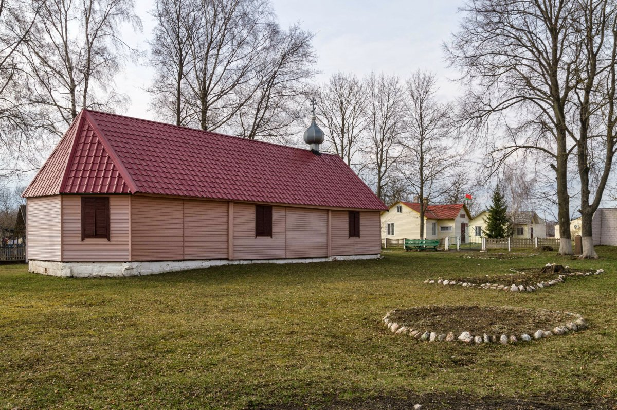 Ёды. Свята-Ільінская царква